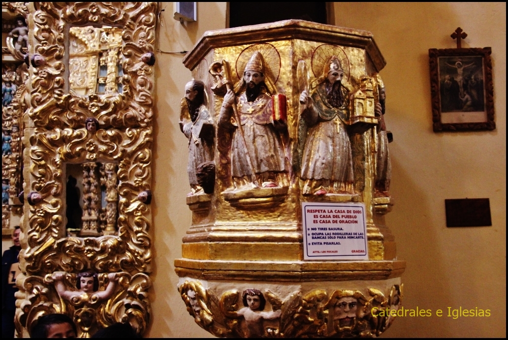 Templo San Francisco (San Francisco Acatepec) San Andrés Cholula,Estado de Puebla,México (33933281651)